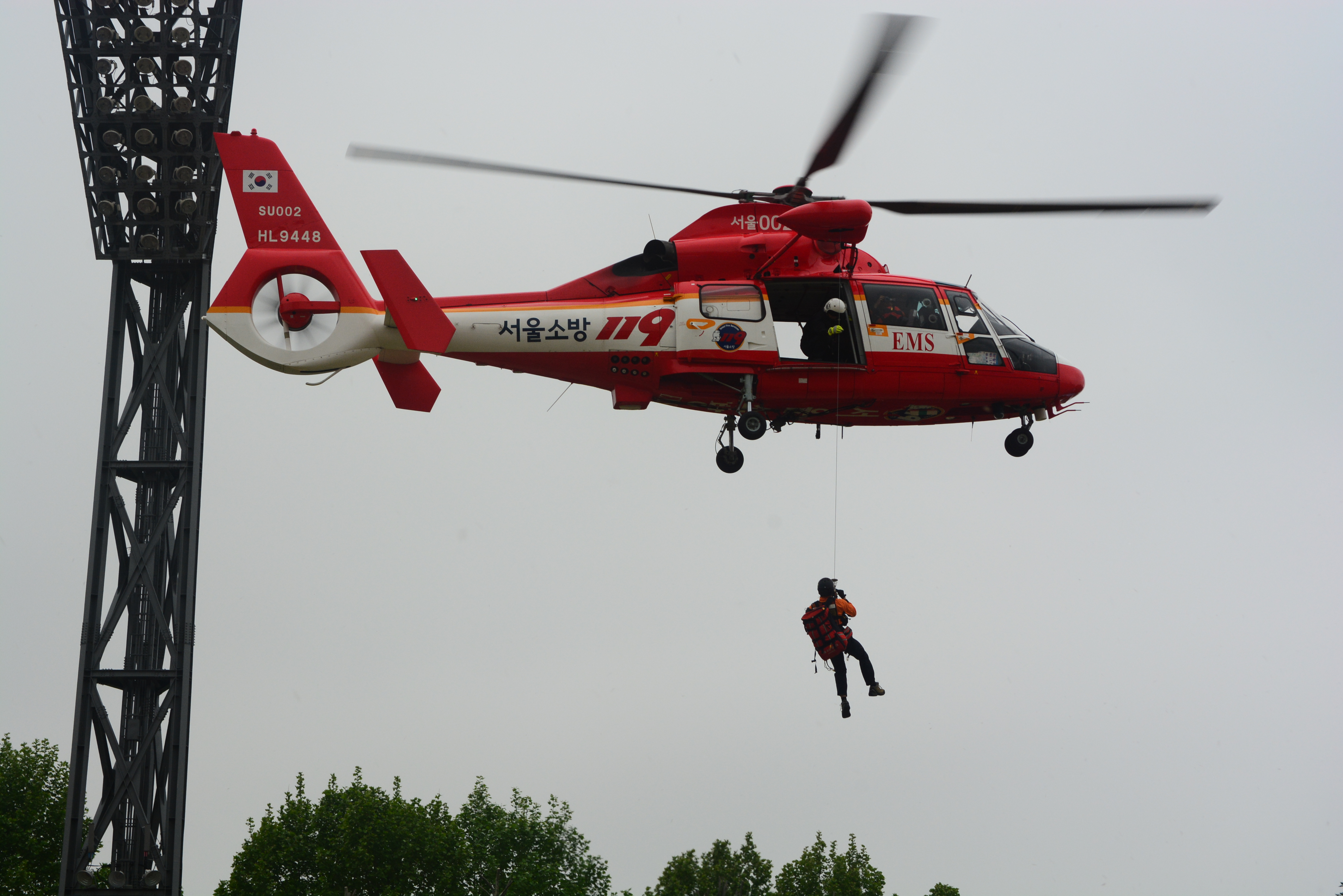 2013년 의용소방대 종합소방기술경연대회